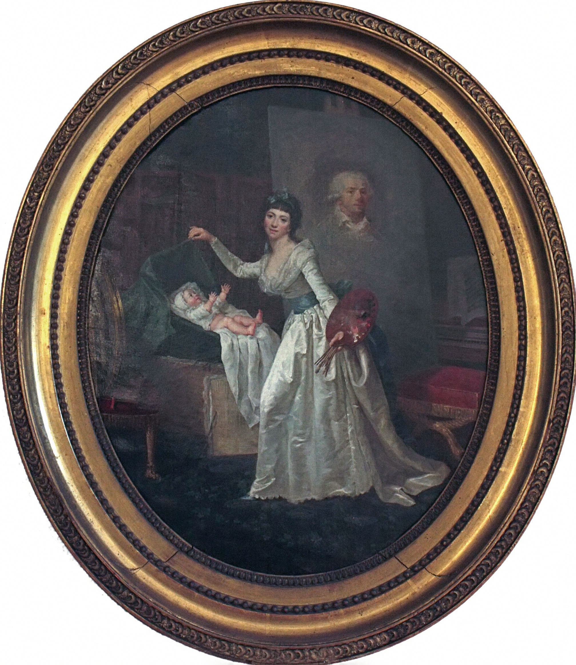 "L'auteur à ses occupations" par Marie-Nicole Dumont (née Marie-Nicole Vestier, 1767-1846), vers 1791.